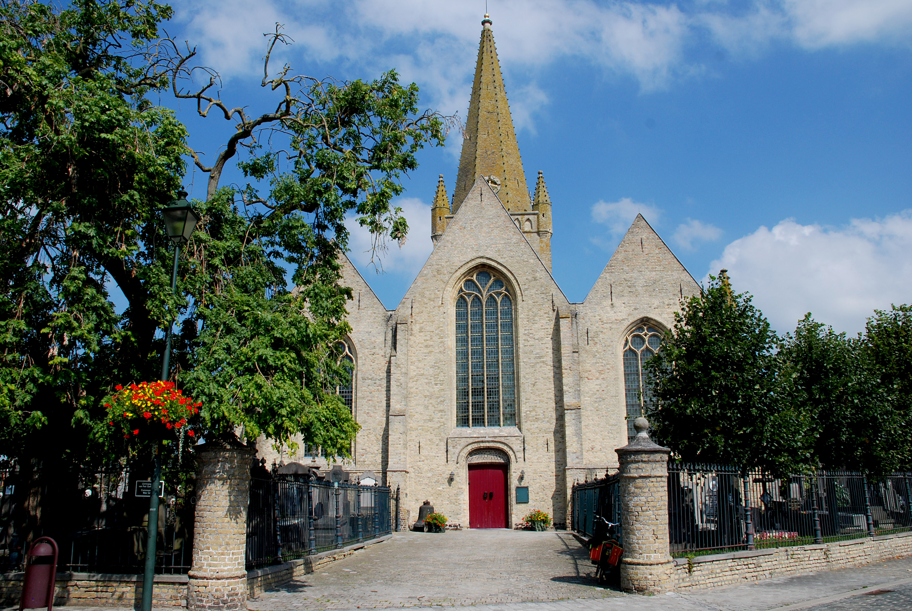 Oostvleteren onroerend erfgoed ID 31563